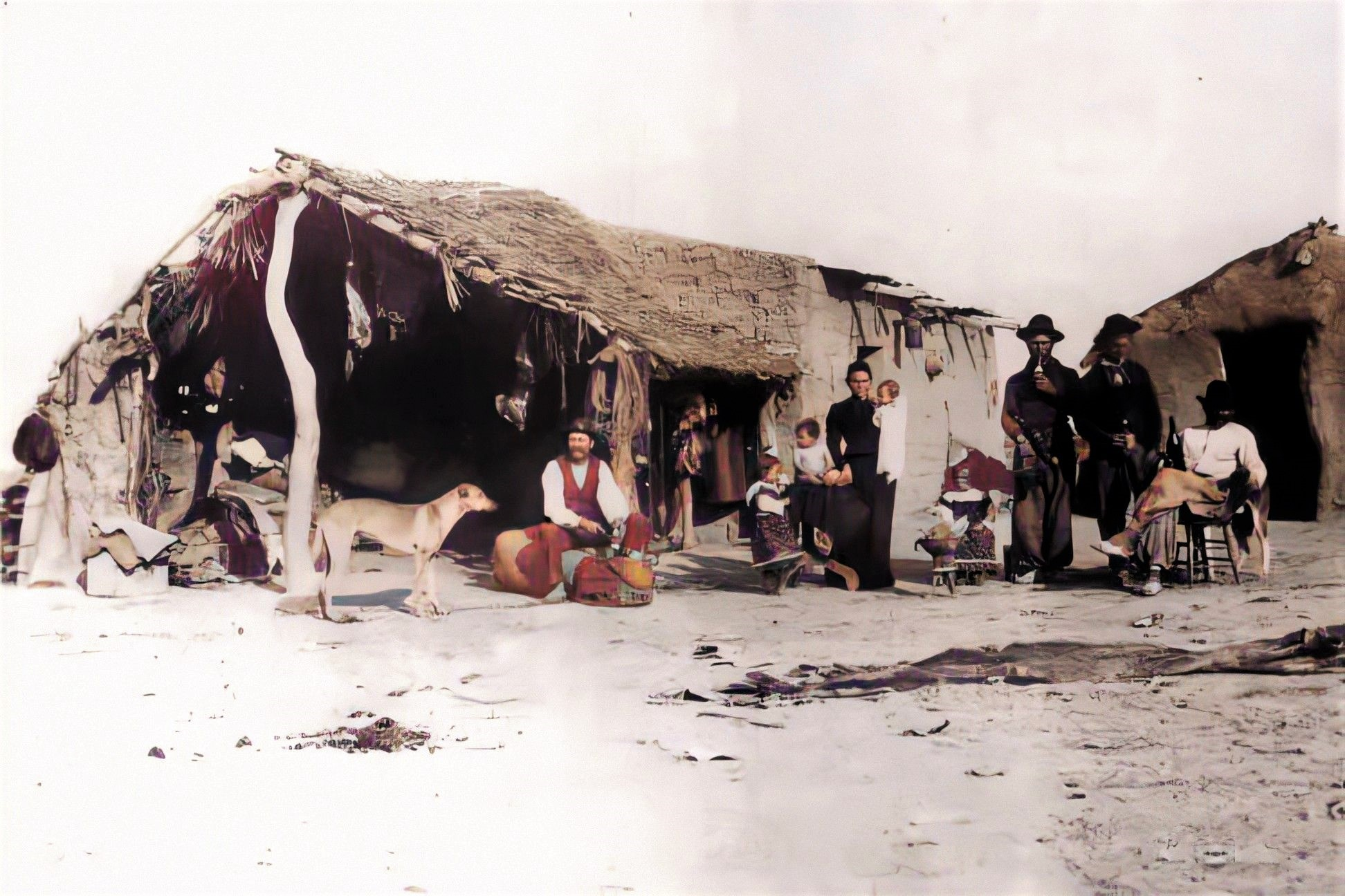 Descriptiva de la vida rural de los primeros colonos. Foto enviada por Hugo R. Hülsberg a sus parientes en Alemania, probablemente tomada por él